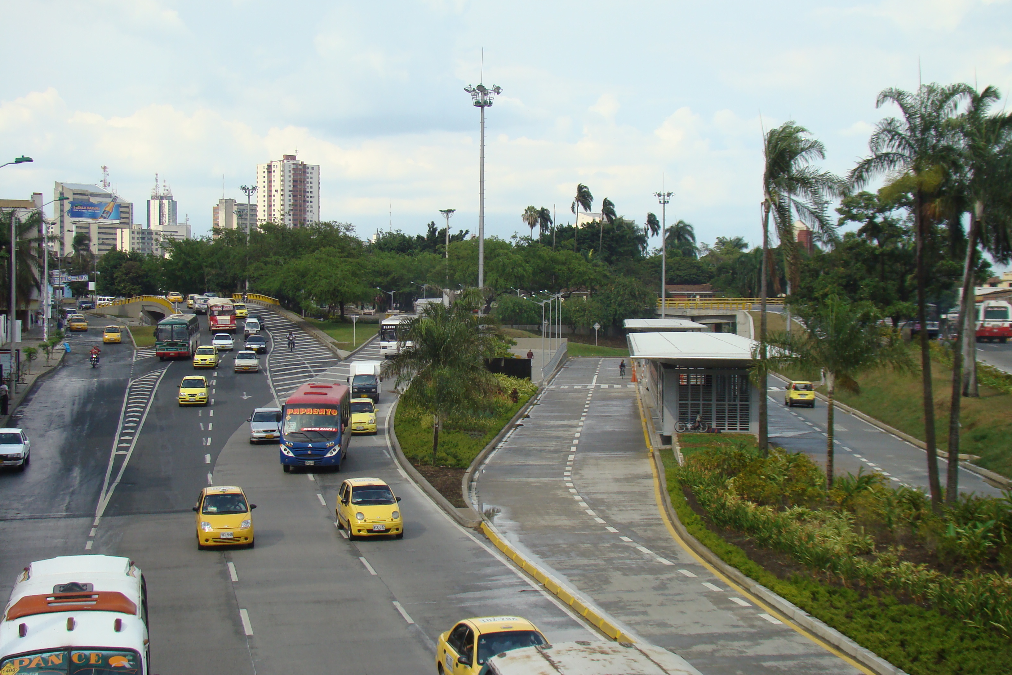 MIO cali, colombia.